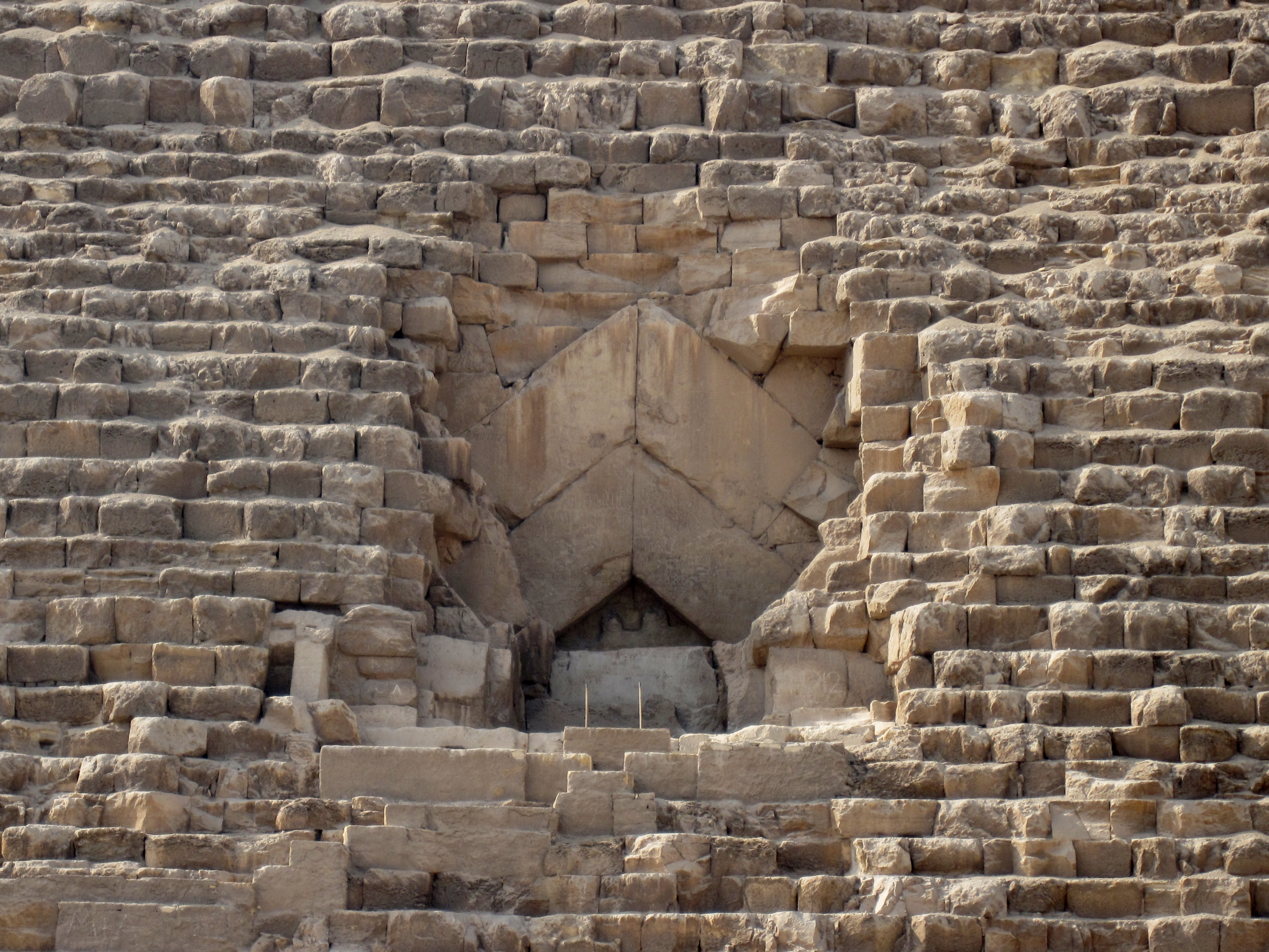 Detail der Nordseite der Cheops-Pyramide auf dem Giseh-Plateau bei Kairo, Ägypten